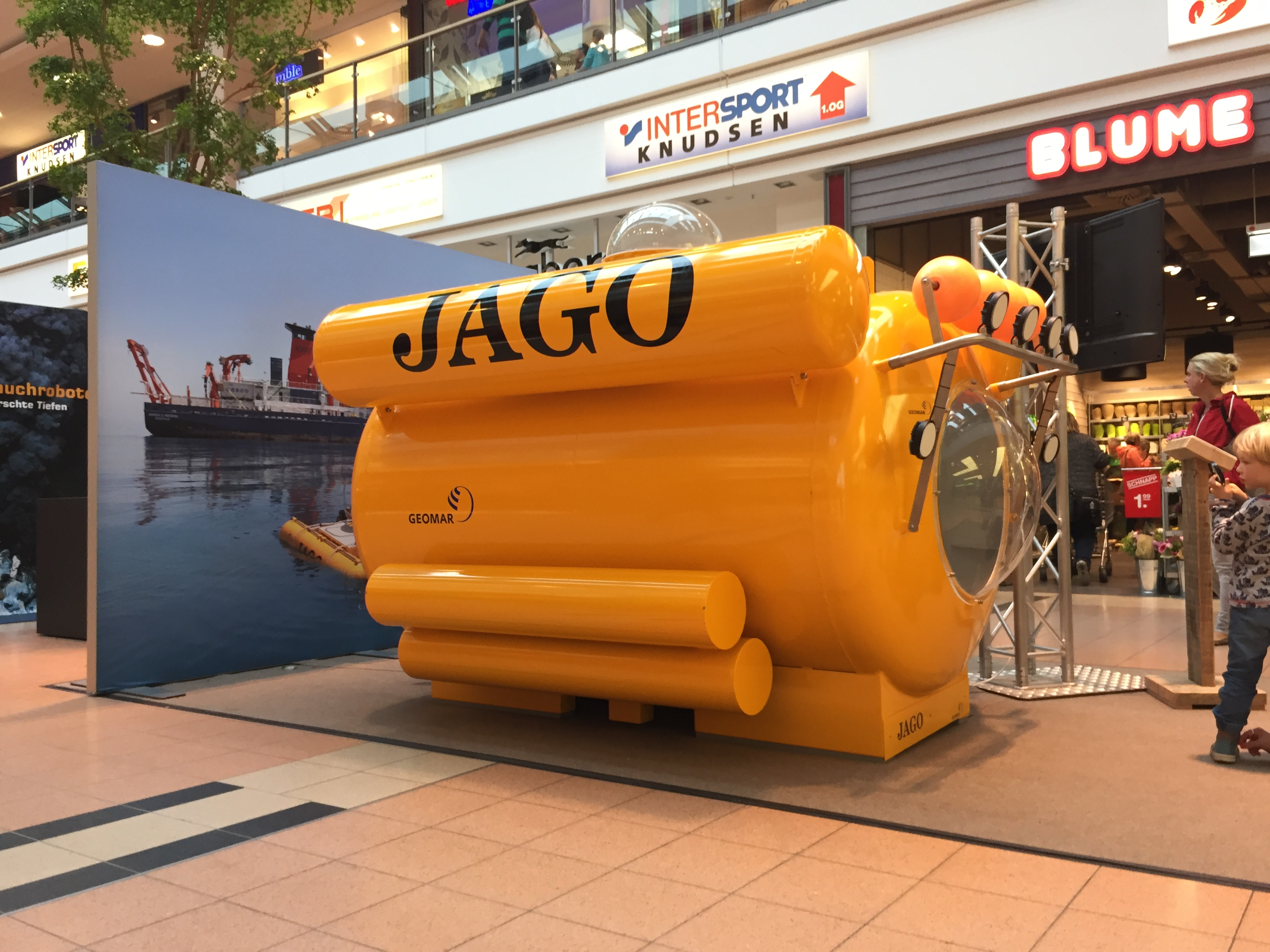 GEOMAR - Tauchschiff JAGO, 1:1-Modell von Geomar